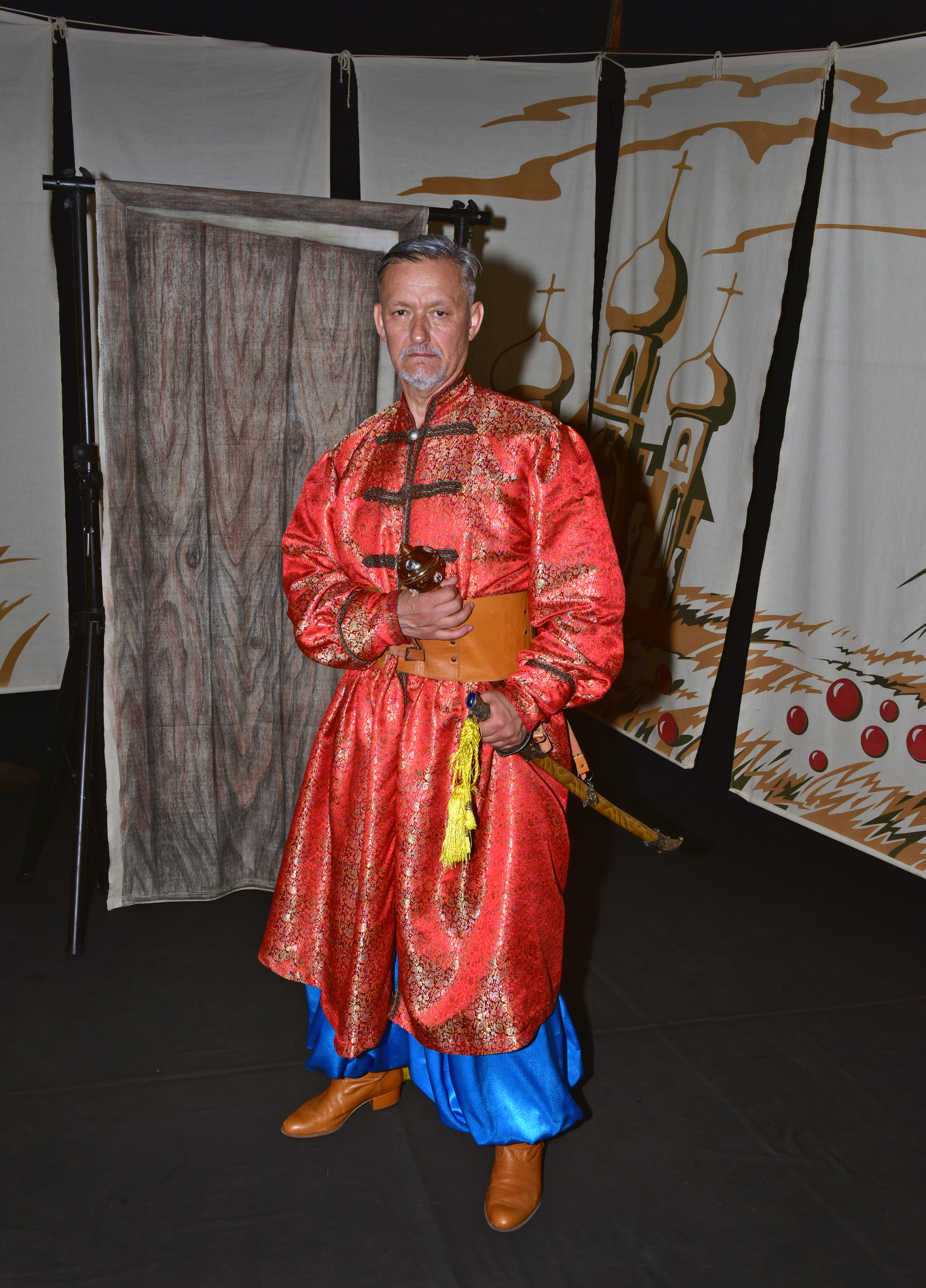 Володимир Смотритель народився 13 січня 1953 року у м. Городище Черкаської області.